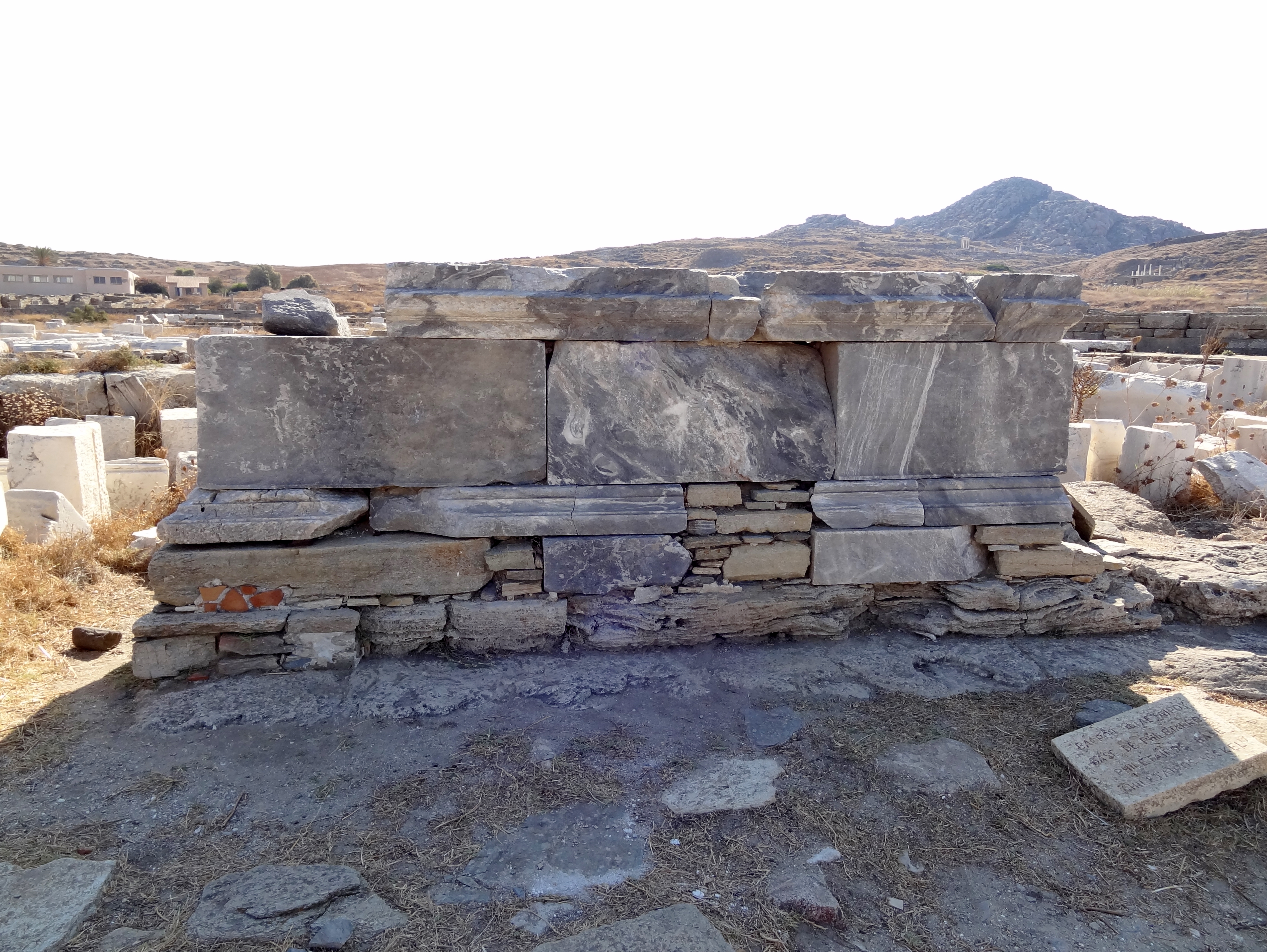 Philetairos-Sockel vor dem Poros-Tempel der Athener in der Ausgrabungsstätte von Delos, Kykladen, Griechenland